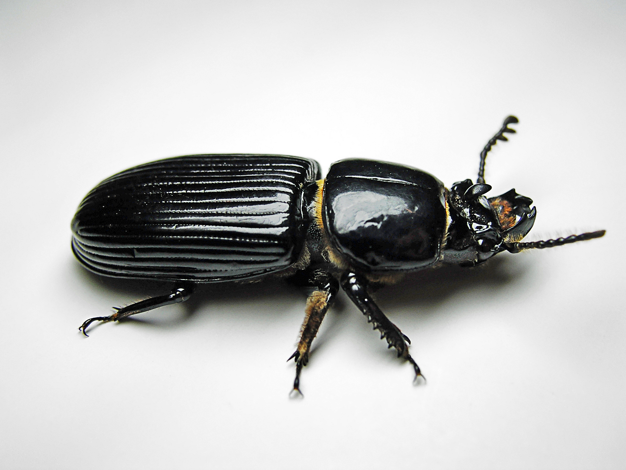 Adult Bessbug (Odontotaenius disjunctus)